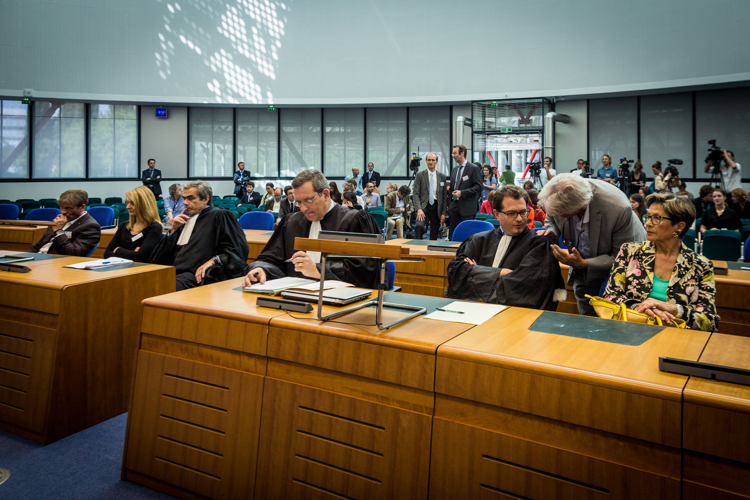 CEDH Affaire Vincent Lambert Strasbourg 5 juin 2015. À gauche, Rachel Lambert, épouse de Vincent Lambert et son avocat Me Laurent Pettiti ; à droite, Viviane Lambert et ses avocats Me Jean Paillot et Me Jérôme Triomphe.